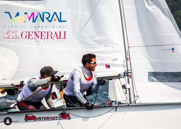 Niccolò Bertola e Mattia Saggio Campioni Mondiali Vaurien 2019